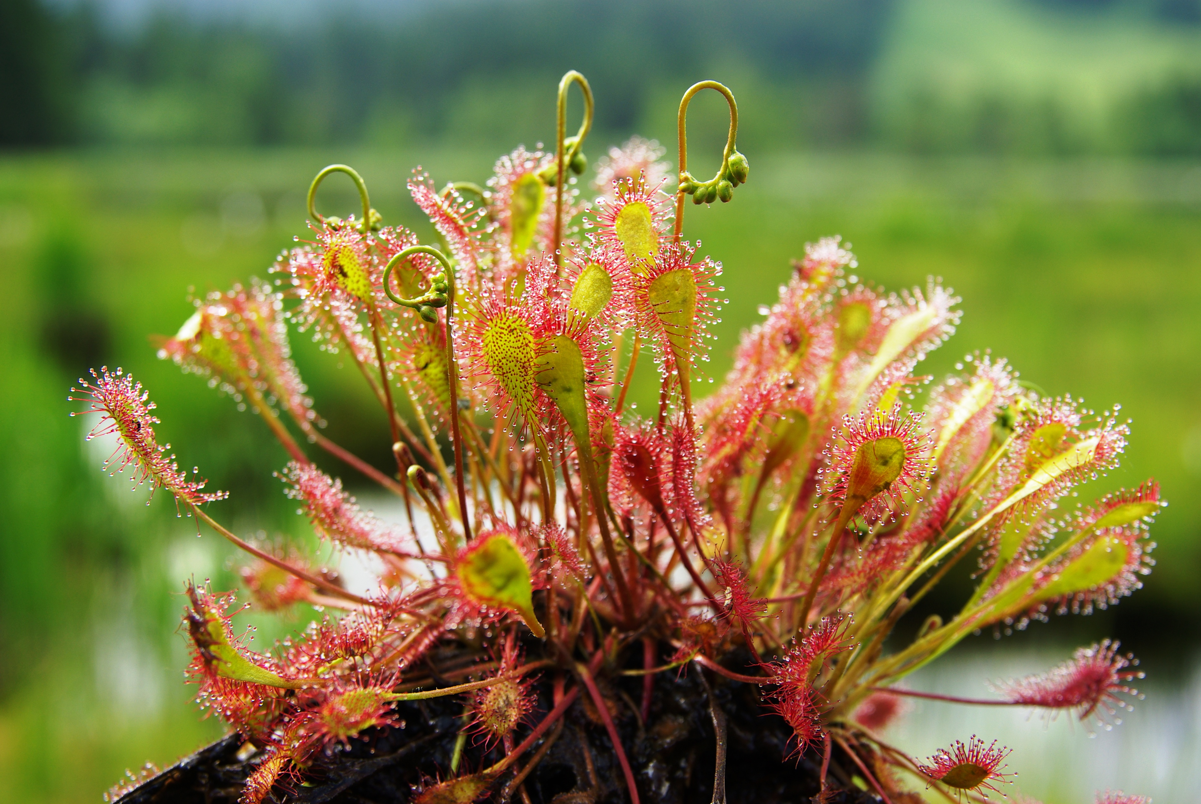 Le Droséra à feuilles ovales (Drosera x obovata) est une plante insectivore des tourbières de l'hémisphère nord, photographié ici sur la tourbière tremblante de Lispach dans les Hautes-Vosges, France. Cet hybride naturel de Drosera rotundifolia et de Drosera anglica est plus vigoureux que les 2 espèces parentes en compagnie desquelles il est fréquemment observé. Toutes les Droseraceae sont adaptées à des habitats très pauvres en nutriments (tourbières acides à végétation basse, rochers siliceux suintants...). Leurs feuilles spécialisées, configurées en pièges, portent des poils glanduleux qui sécrètent des gouttelettes mucilagineuses réfringentes et adhésives. Les invertébrés attirés par des émanations odorantes s'y engluent. La sensibilité des poils à la composition chimique et aux mouvements des proies (chimiotactisme et thigmotactisme) déclenche l’enroulement progressif des poils et des feuilles autour d'elles. Des enzymes digestives sont sécrétées et il a été démontré par marquage radio-isotopique que les produits de cette digestion externe passent dans la sève. Le genre Drosera est protégé en France et ne peut être récolté en milieu naturel que sur dérogation préfectorale pour la phytopharmacie et la recherche.Rumantsch: Die Sonnentau Hybride Drosera x obovata - Lispach Moore in den französischen Hoch Vosesen.